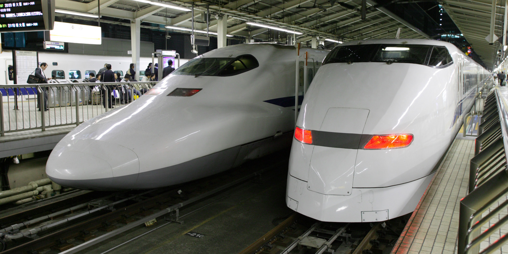 Tōkaidō Shinkansen 700 & 300, at Tokyo Station.